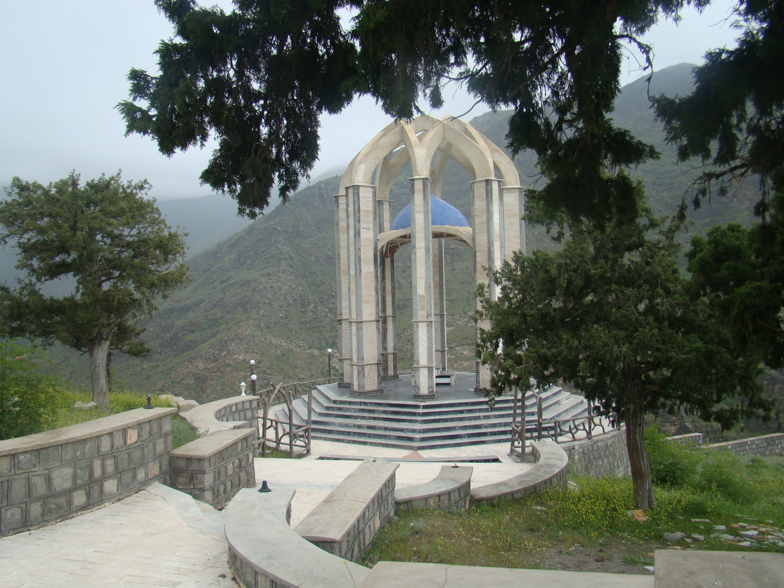 Seyid Əbülqasim Nəbatinin məqbərəsi